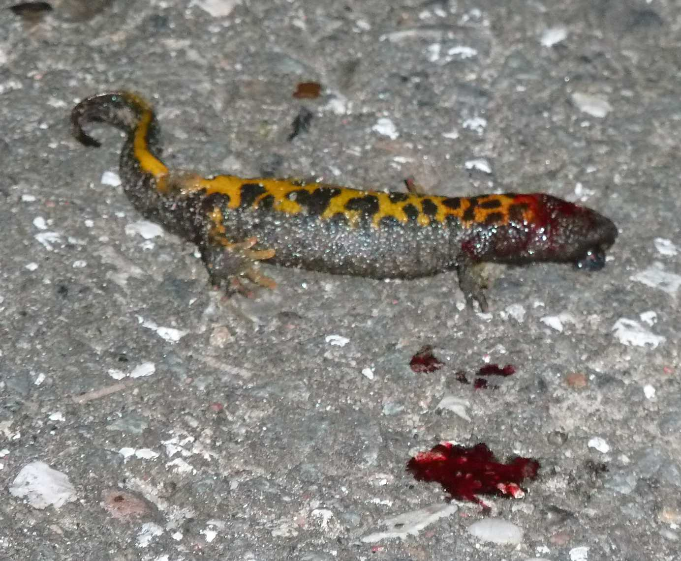 Überfahrener Kammmolch auf dem (befahrenen) Reitdeich.